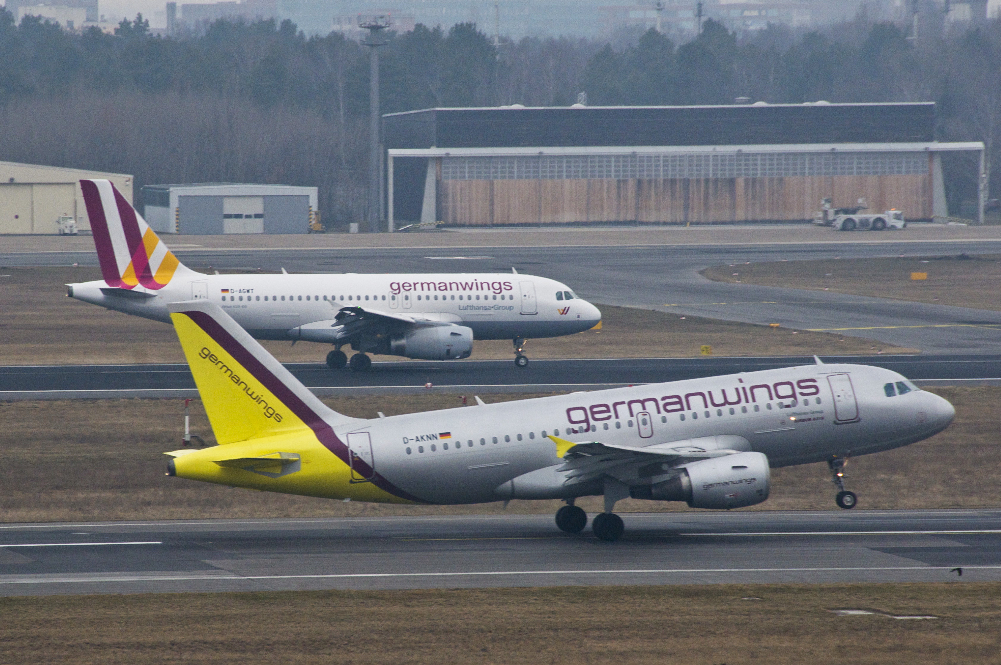 Germanwings Airbus A319-112; D-AKNN@TXL;10.04.2013/702eg